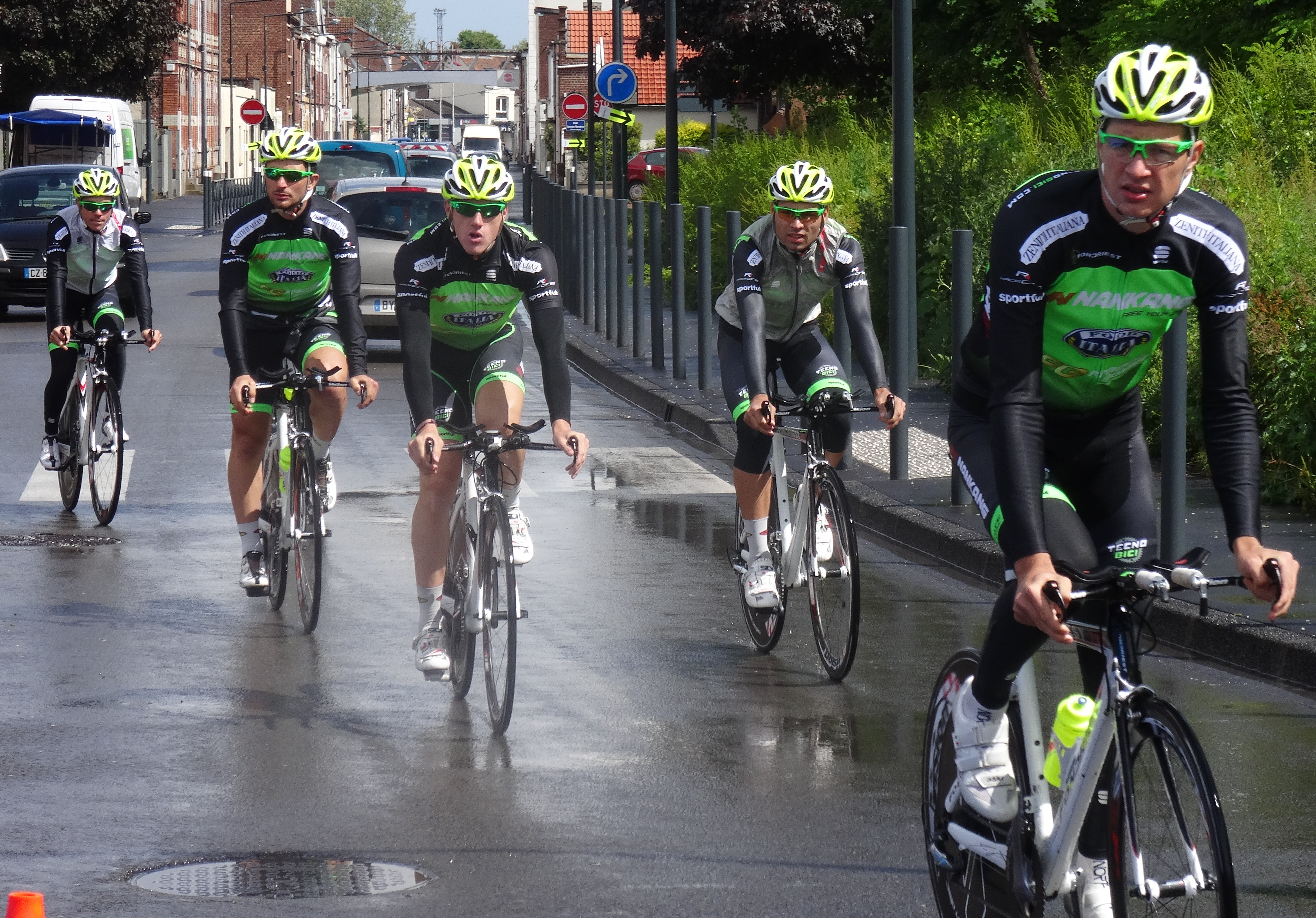 Reportage photographique réalisé le vendredi 23 mai 2014 à l'occasion du départ de la première étape du Paris-Arras Tour 2014 à Lens, Pas-de-Calais, Nord-Pas-de-Calais, France.